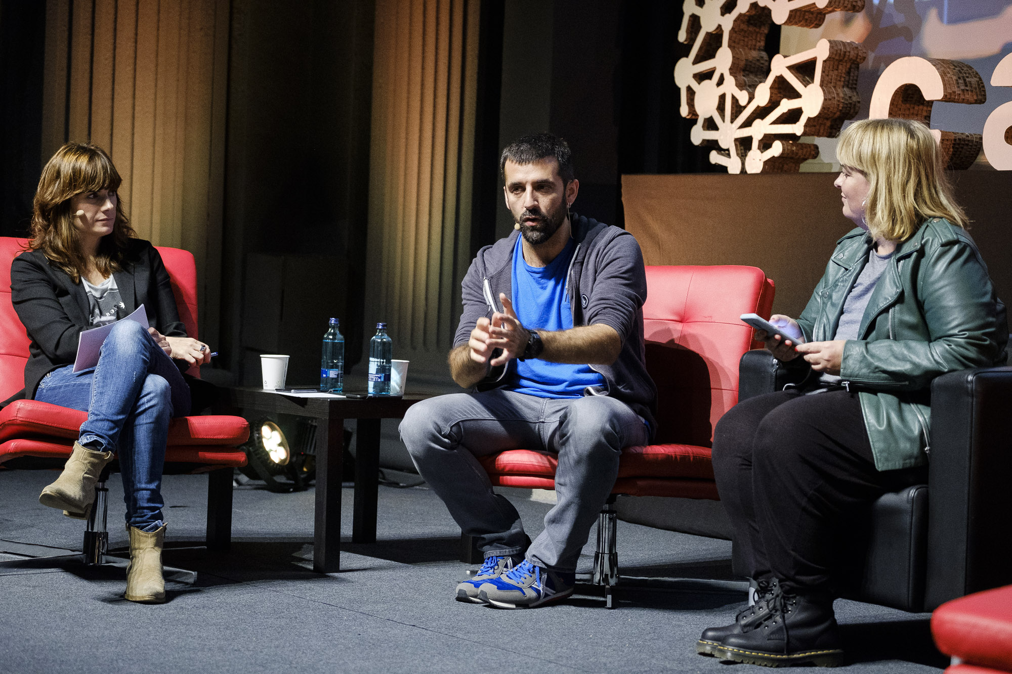 Catosfera 2018 divendres tarda